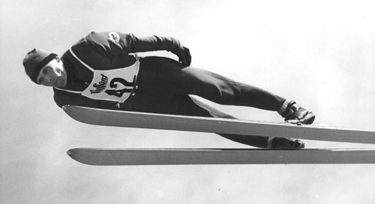 Zentralbild Thieme 10.3.1968 Zakopane: Czech-Marusarz-Memorial - Horst Queck gewann Spezialsprunglauf Horst Queck (SC Meter Zella-Mahlis)- Archivfoto von den DDR-Meisterschaften 1968 in Oberhof - gewann am 9.3.1968 beim traditionellen Czech-Marusarz-Memorial in Zakopane den ersten Spezialsprunglauf auf der großen Schanze mit Note 229,9 für Weiten von 100,5 und 101 m.